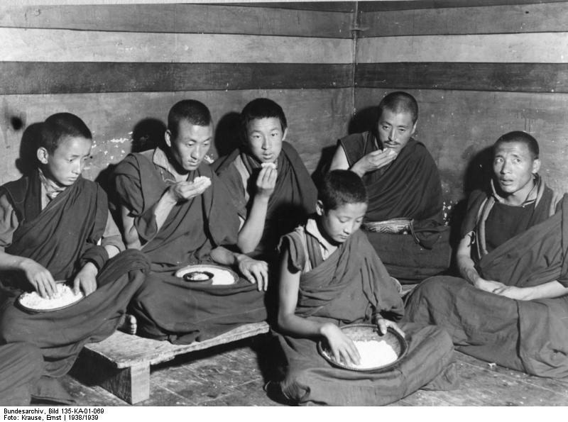 Tibetexpedition, Mönche beim Essen Gangtok, Lama bei der Mahlzeit